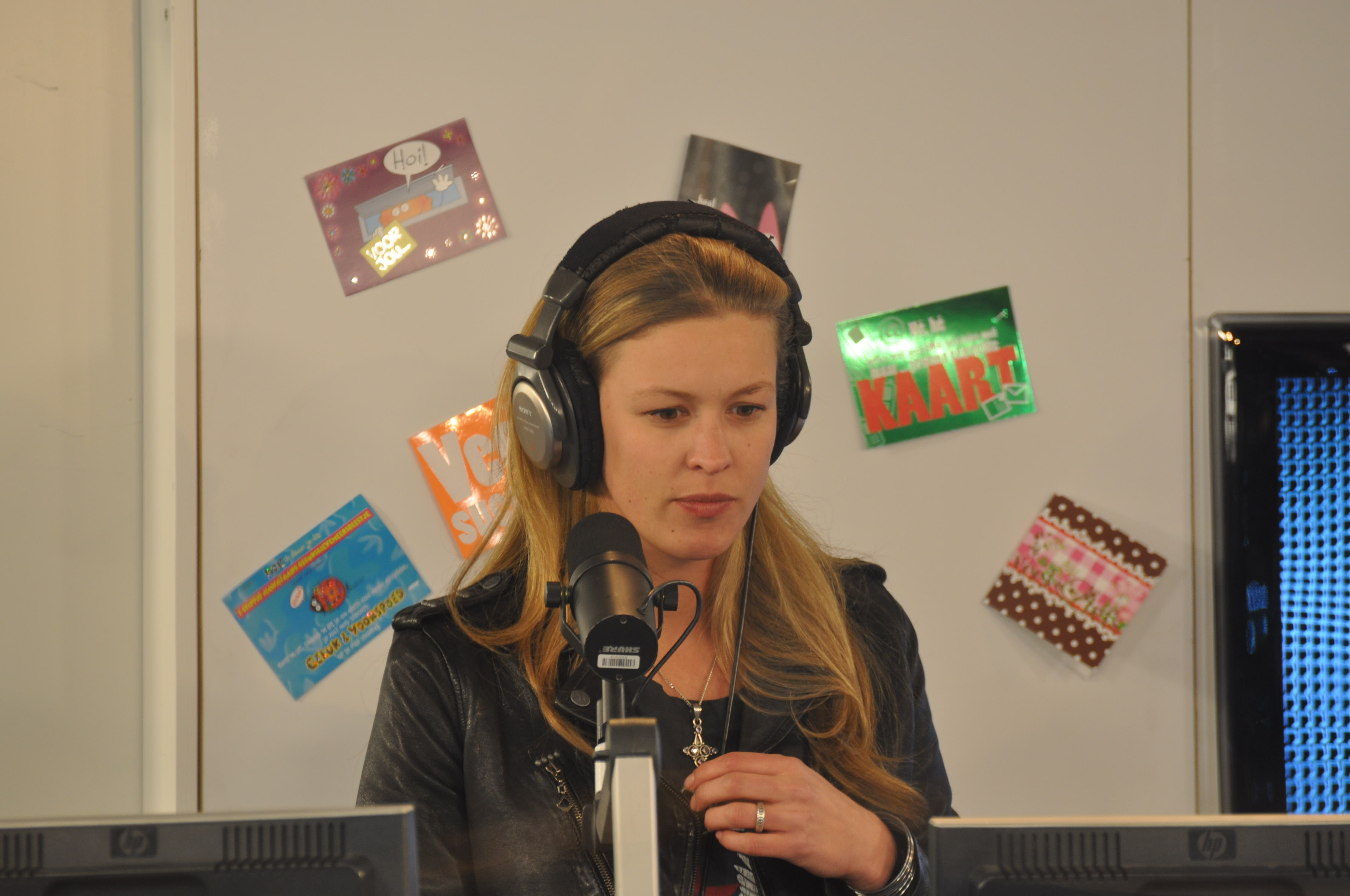 3FM DJ Annemieke Schollaardt in het Glazen Huis tijdens Serious request 2009.